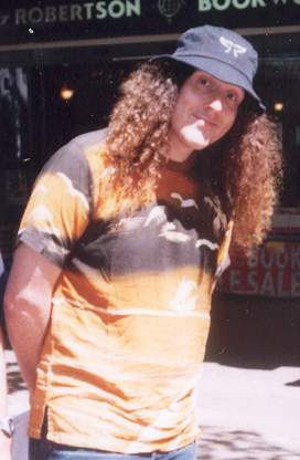 Al Yankovic